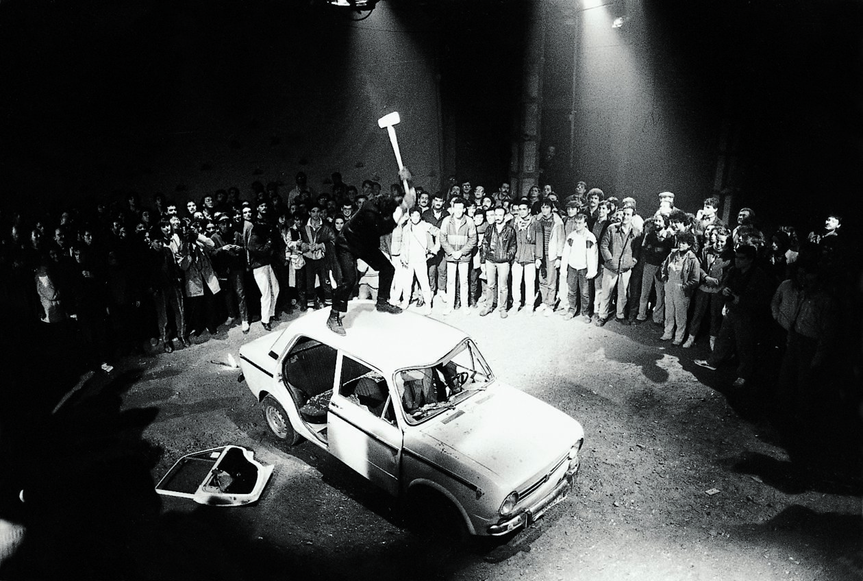 Una escena de l'espectacle Accions